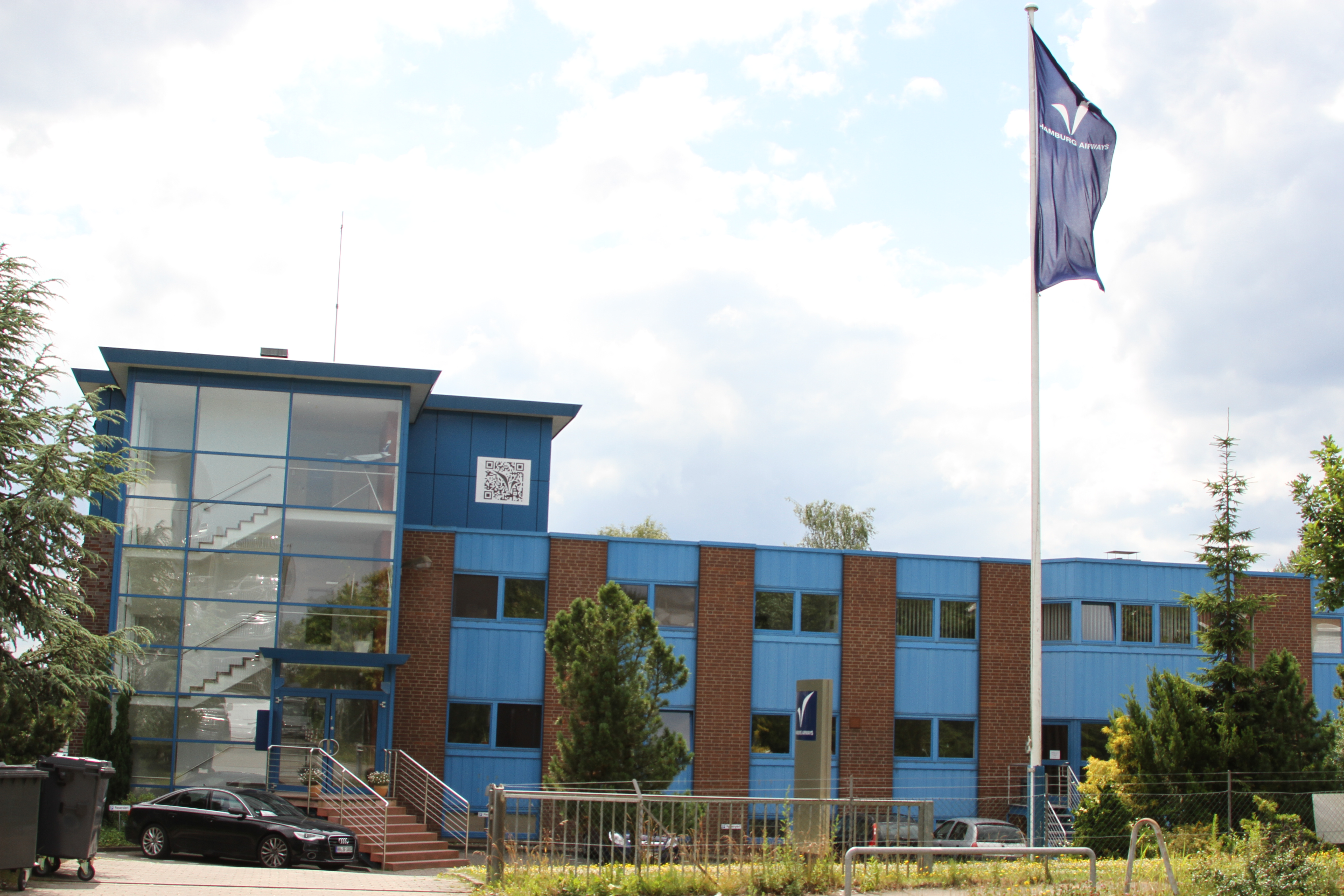 HHA Hamburg Airways Luftverkehrgesellschaft mbH ist eine deutsche Charterfluggesellschaft mit Sitz in Hamburg.